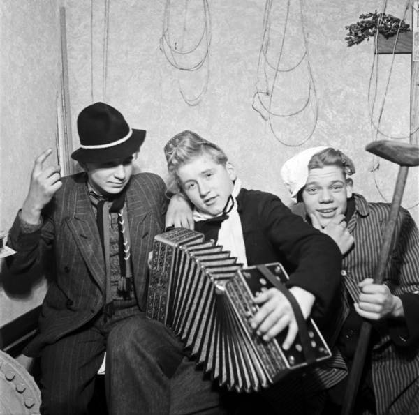 Gruppe ausgelassener junger Leute bei einem Kostümfest der Landjugend, um 1950, vermutlich Westfalen